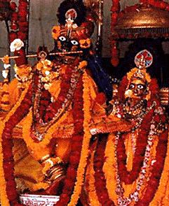 Radha Govindaji